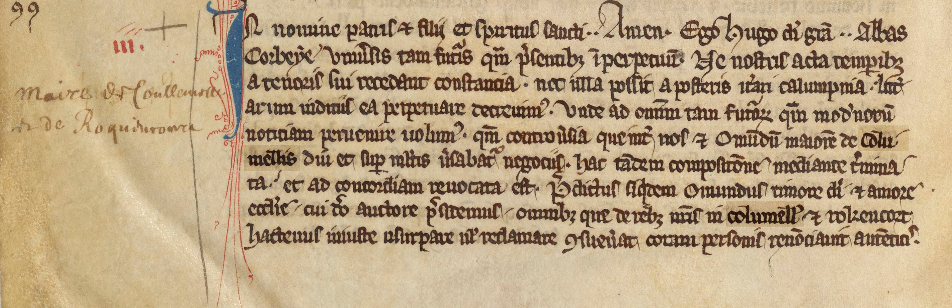 cartulaire de Corbie. Accord avec le maire de Coullemelle